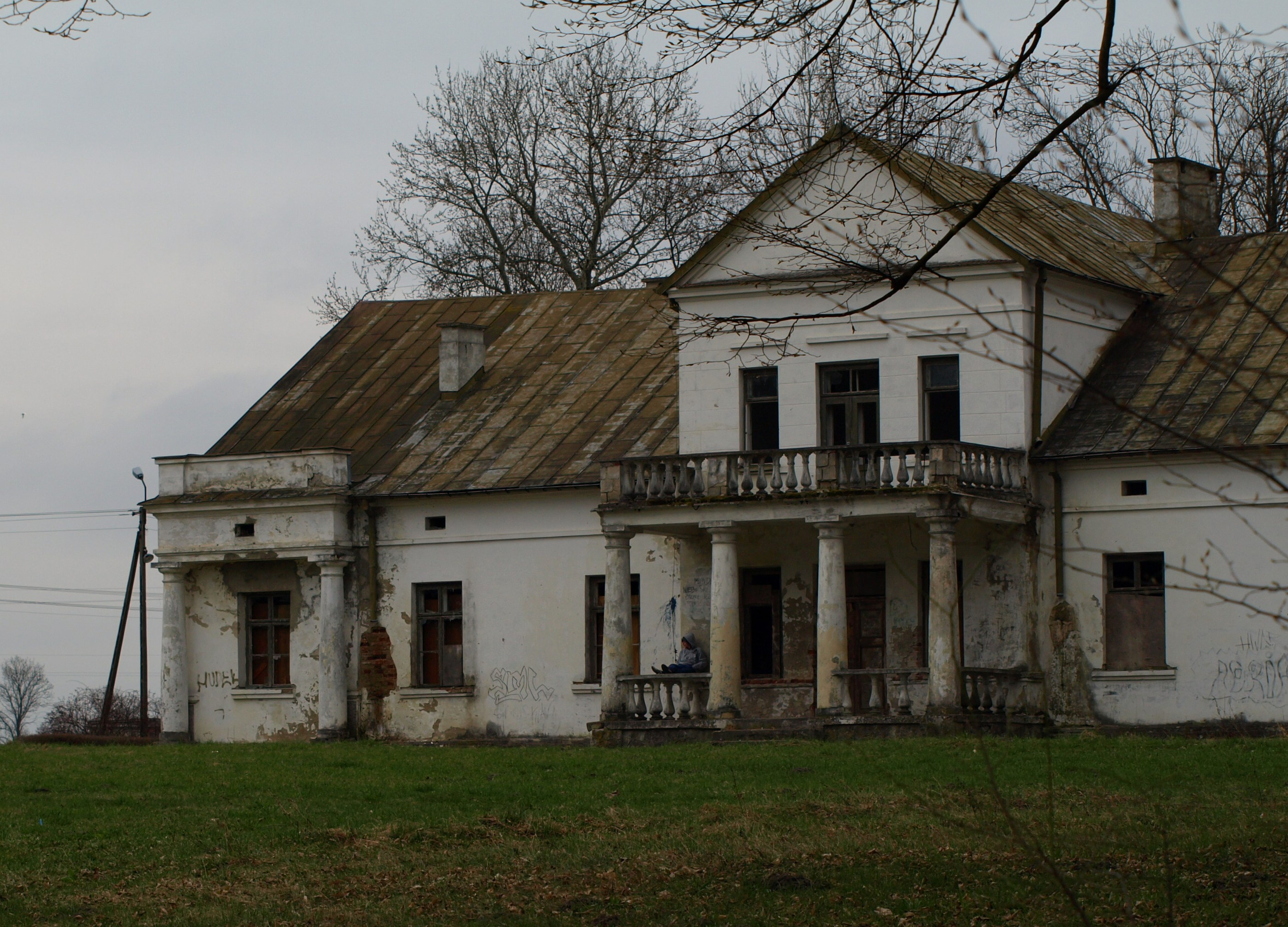 Dwór w Gładczynie k/Pułtuska. Pozostałość po majątku Gładczyn, aktualnie stojący w otoczeniu bloków mieszkalnych, wzniesionych dla pracowników PGR Gładczyn. Stan z 06.04.2010 (zabytek nr rejestr. A-348)